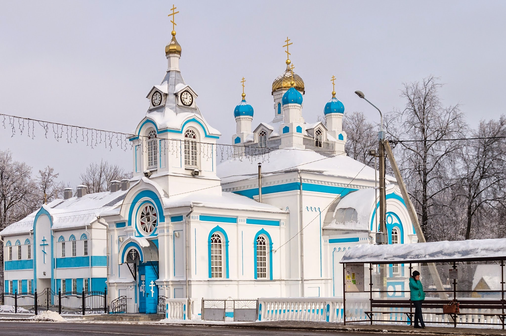 Царква ў імя святой прападобнай Марыі Егіпецкай (Вілейка)